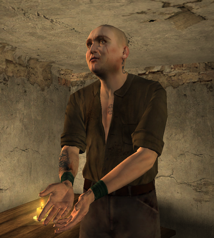 Capture d'écran du jeu Sherlock Holmes contre Jack l'Éventreur. « Squibby », arborant de nombreux tatouages, ici dans une cellule du commissariat de Whitechapel après l'émeute dans laquelle il a été impliqué.